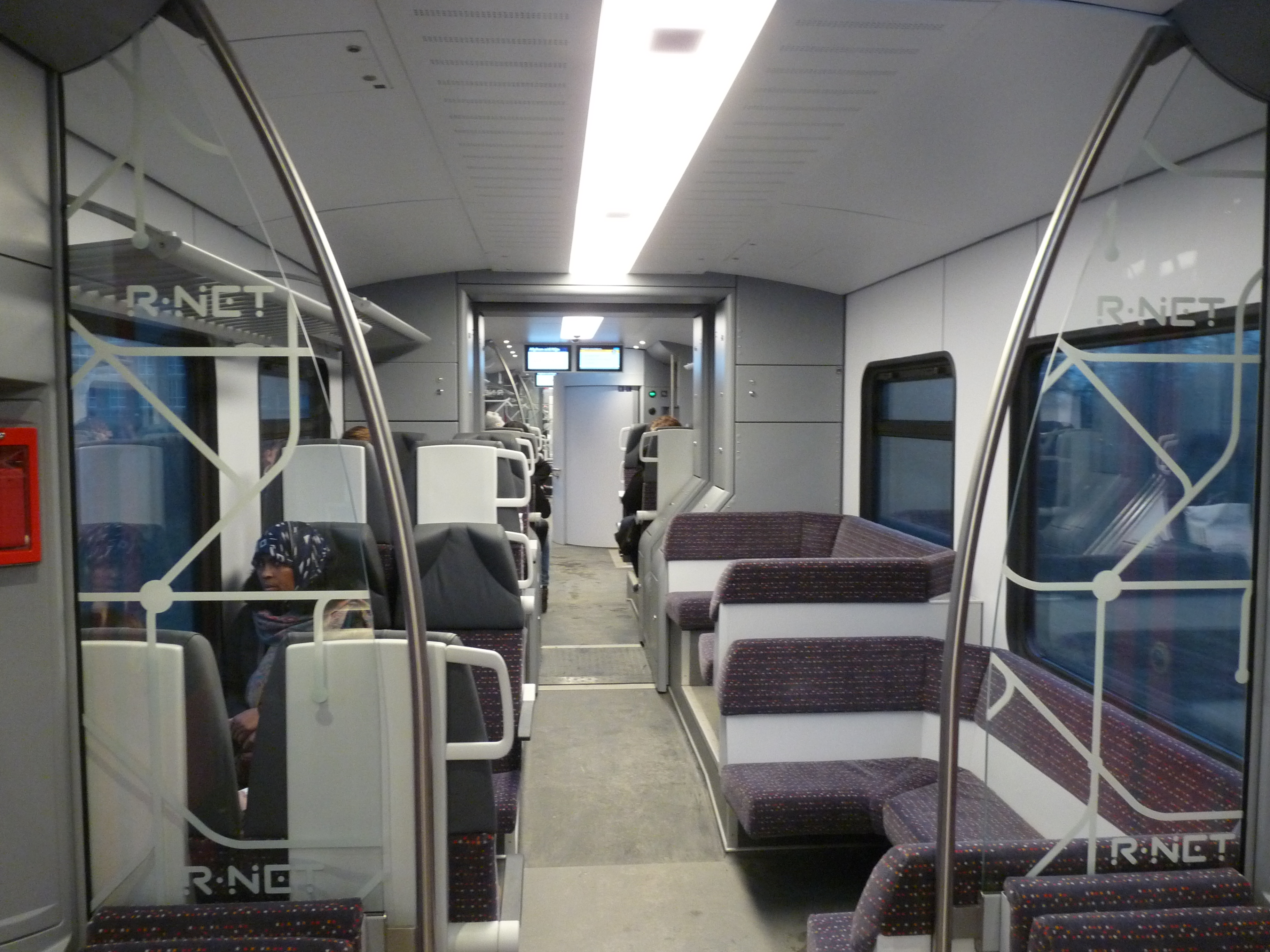 Het interieur van een Stadler FLIRT van R-Net